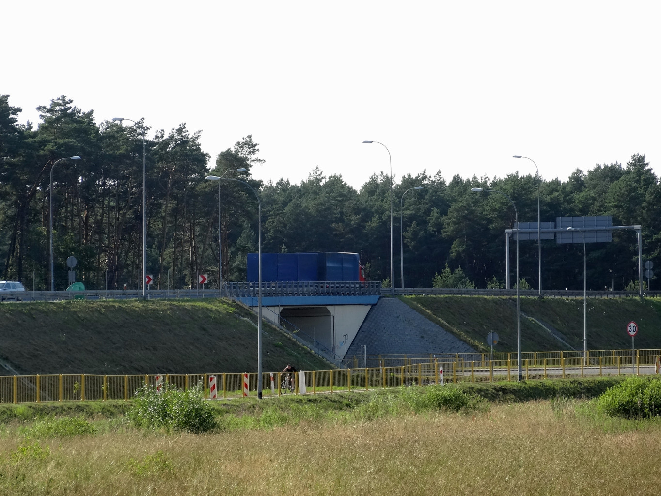 Puszcza Bydgoska w okolicy Białych Błót